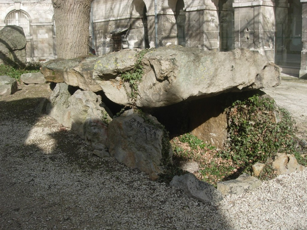 Dolmen Allée couverte dite de Frécul. France : Barbuise-Courtavant. Aube. Musée Saint-Loup à Troyes. de Troyes.